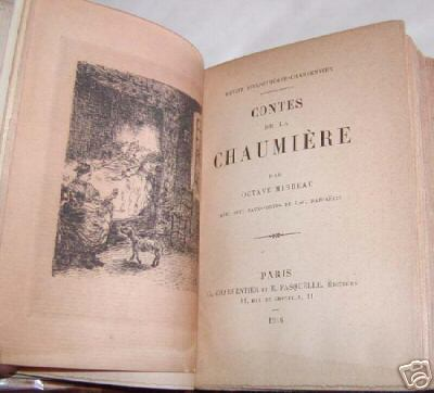 Contes de la chaumière, d'Octave Mirbeau (4848-1917)